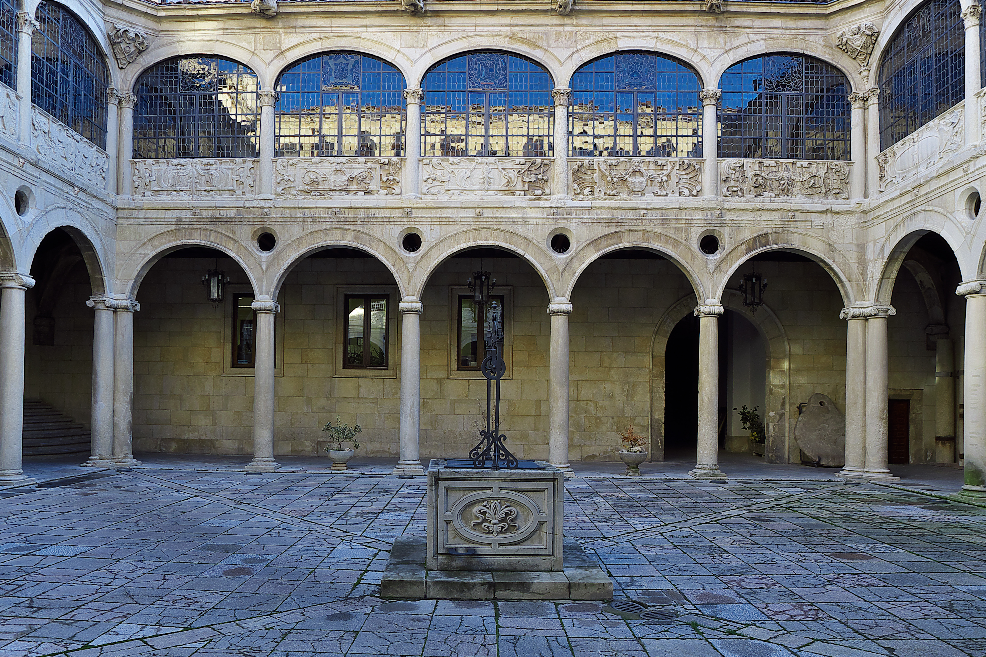 Juan de Ribero Rada realiza el patio del palacio de Ramiro Núñez de Guzmán con planos de Rodrigo Gil de Hontañón. Finales del siglo XVI.